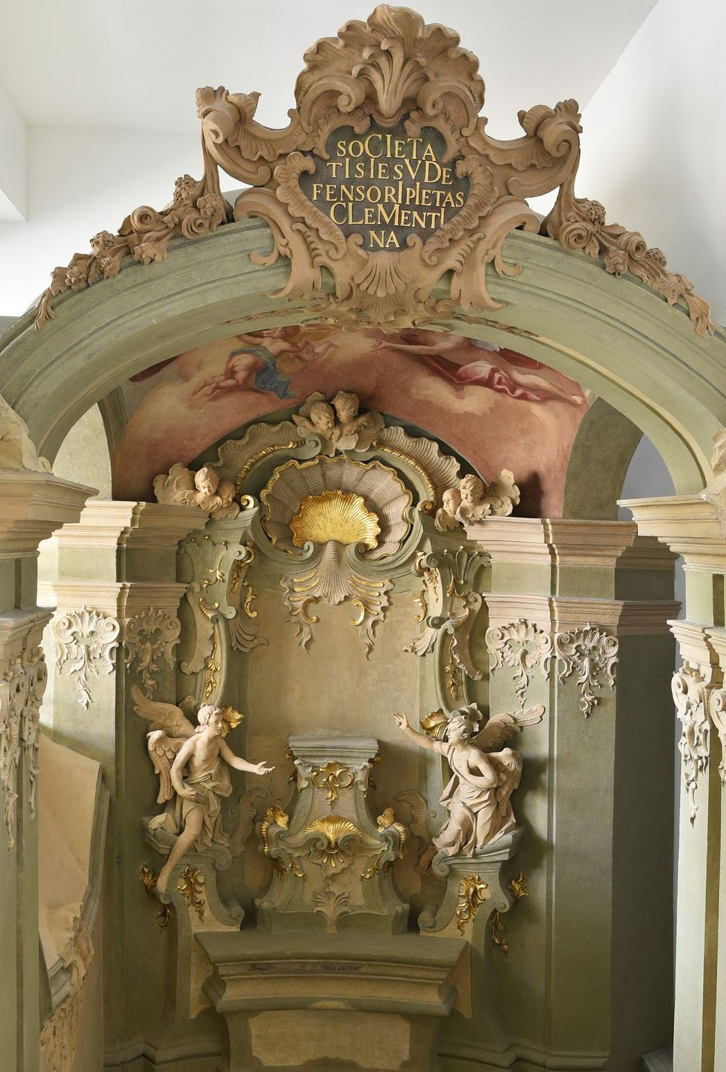 vstup do Slovanské knihovny